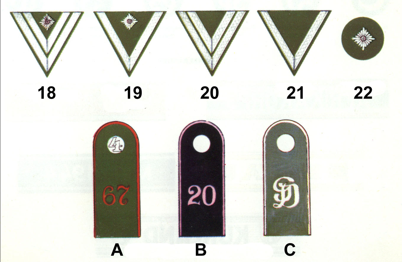 Rangabzeichen der deutschen Wehrmacht bis 1945; Mannschaften hier: Ziffer 18 bis 22 Ärmel-Rangabzeichen linker Oberarm 18 – Stabsgefreiter (StGefr) OR-4 19 – Obergefreiter (OGefr) OR-3a mehr als 6 Dienstjahre 20 – Obergefreiter (OGefr) OR-3b unter 6 Dienstjahre 21 – Gefreiter (Gefr) OR-2 22 – Obergrsoldat OR-1a Buchstabe A bis C Schulterklappen Mannschaften OR4 bis 1b A – Artillerie (Wafenfarbe – rot) B – Panzer (Wafenfarbe – rosa) C – Infanterie (Wafenfarbe – weiß)